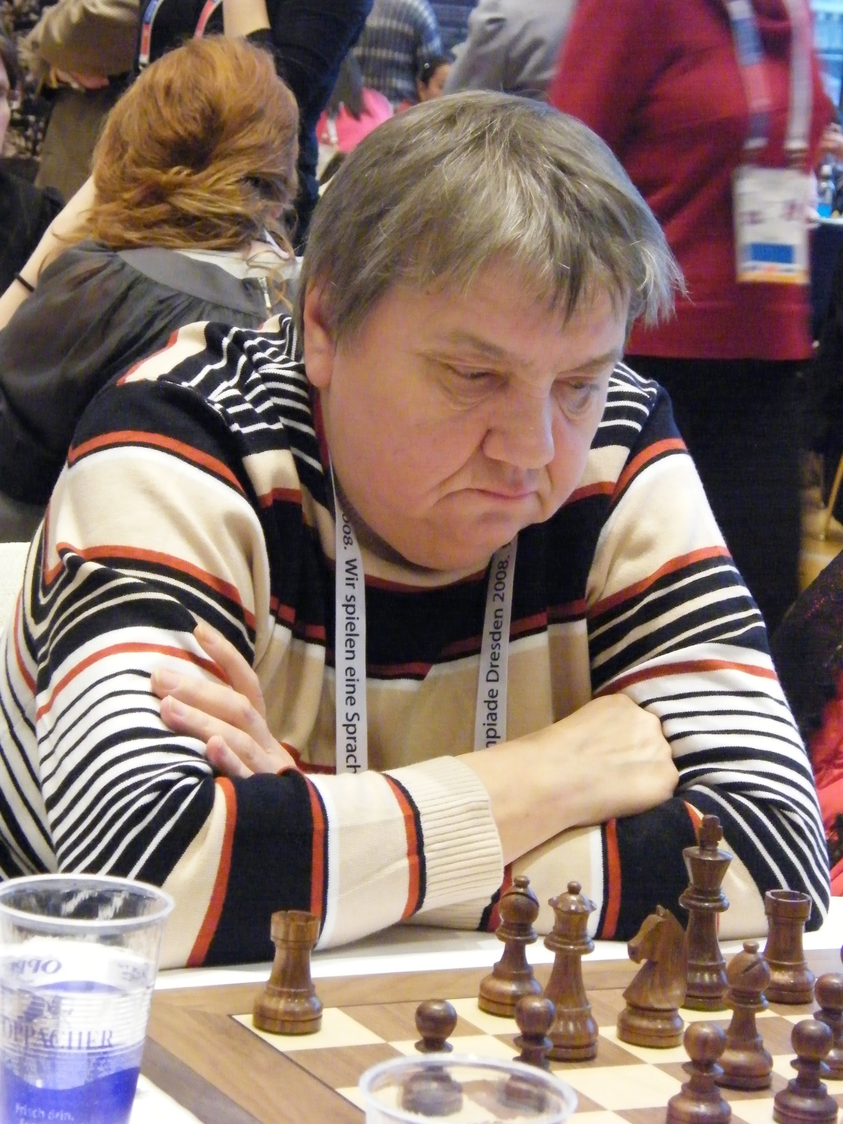 Tatjana Lematschko bei der 38. Schacholympiade in Dresden 2008